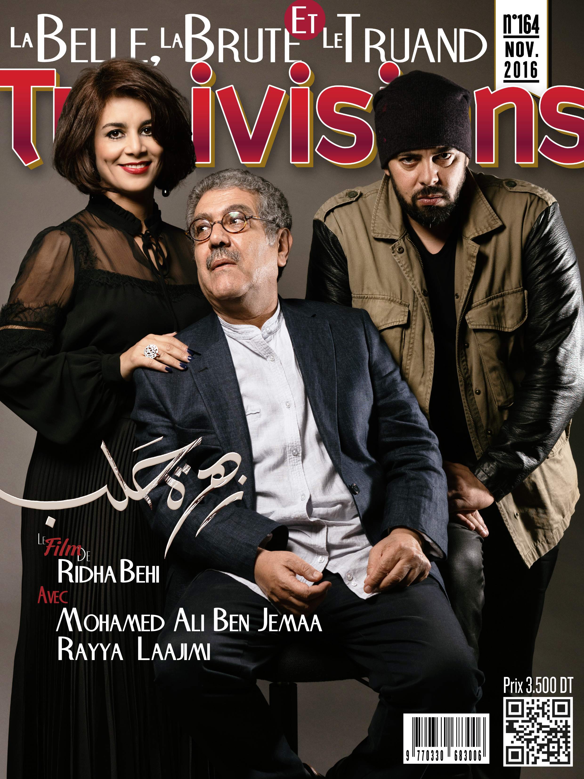 Couverture du numéro 164 du magazine tunisien Tunivisions.